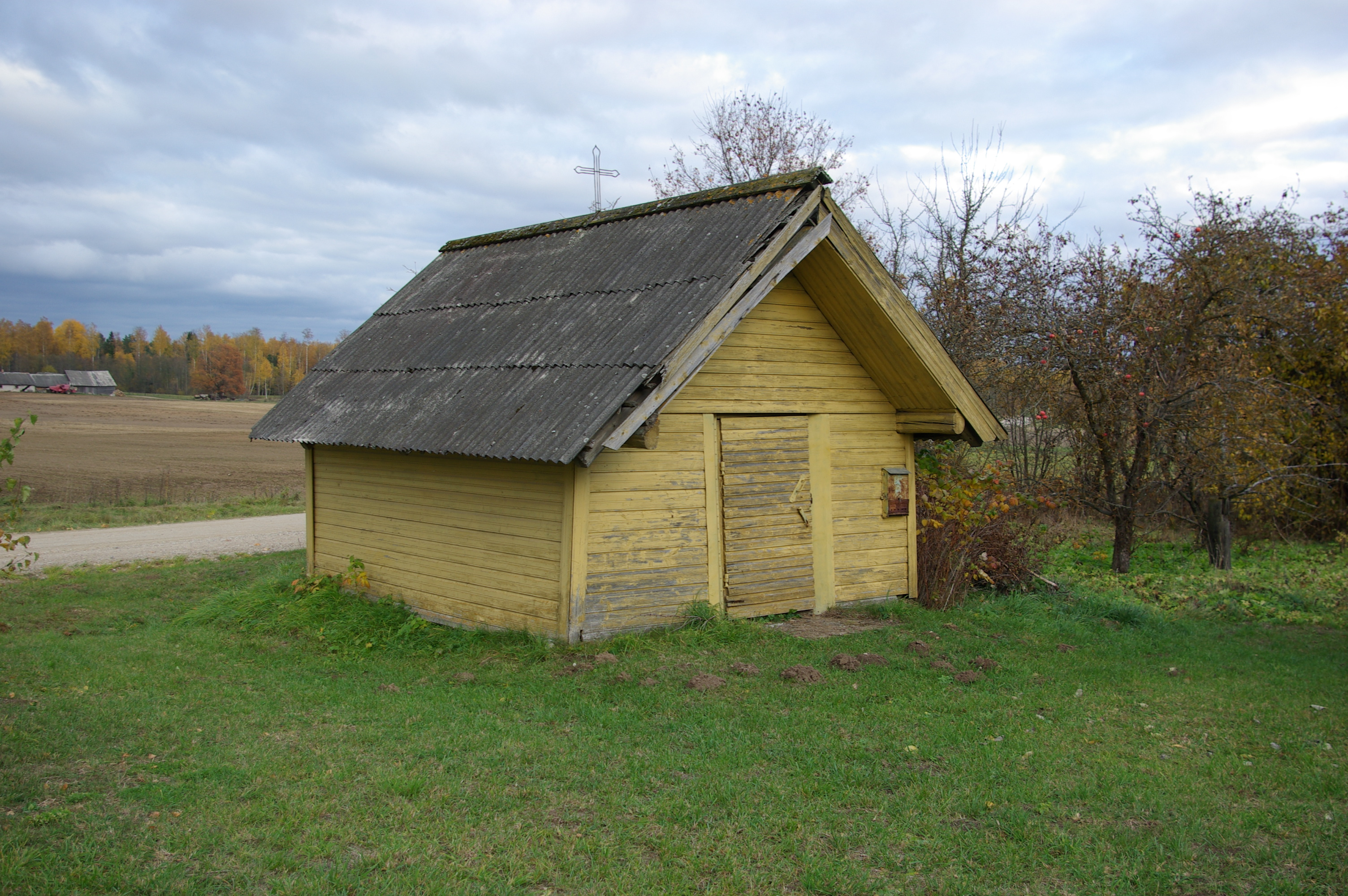 Ulaskova tsässon